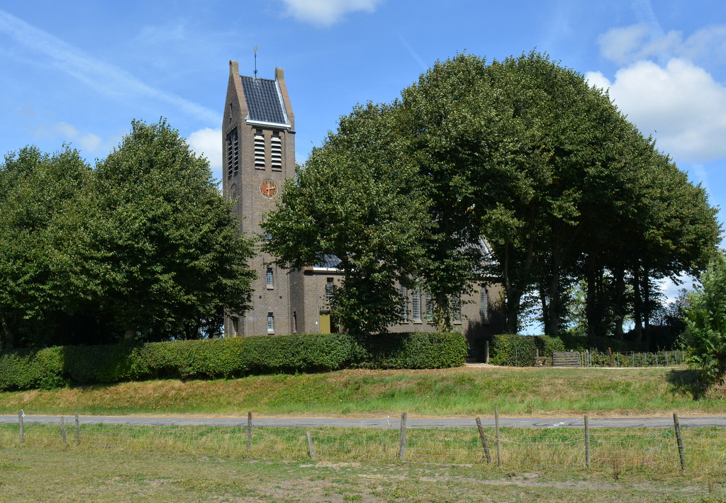 Dionysiustsjerke, Slappeterp